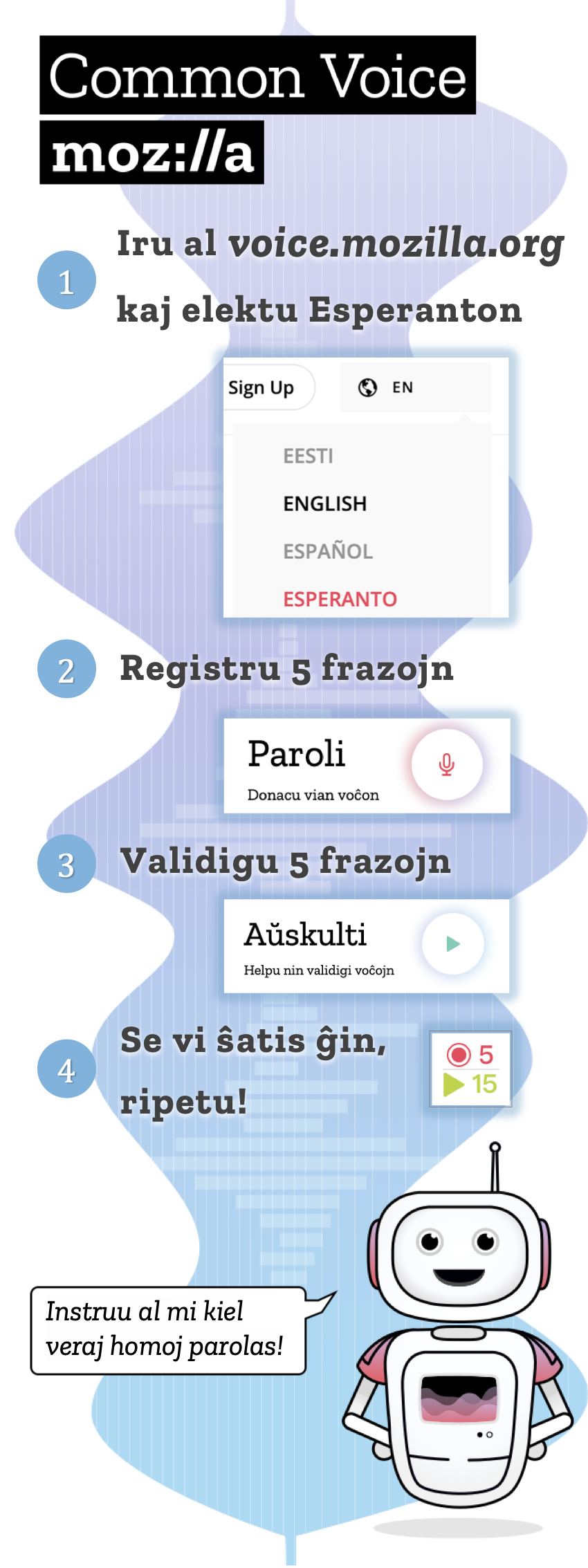 Common Voice howto banner en Esperanto